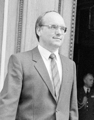 Koningin Beatrix ontvangt de fractievoorzitters van de kleine partijen vanwege de kabinetsformatie: Fractievoorzitter Leerling (RPF)